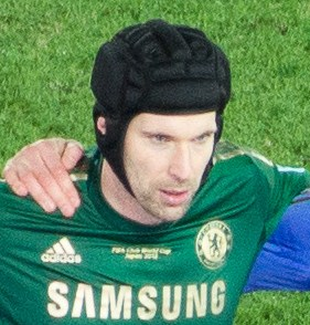 Petr Čech (décembre 2012)